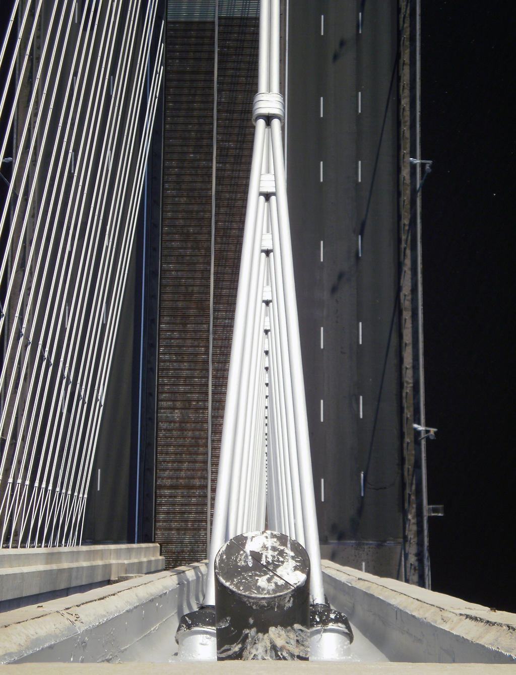 Південний міст у Києві: Кріплення вант